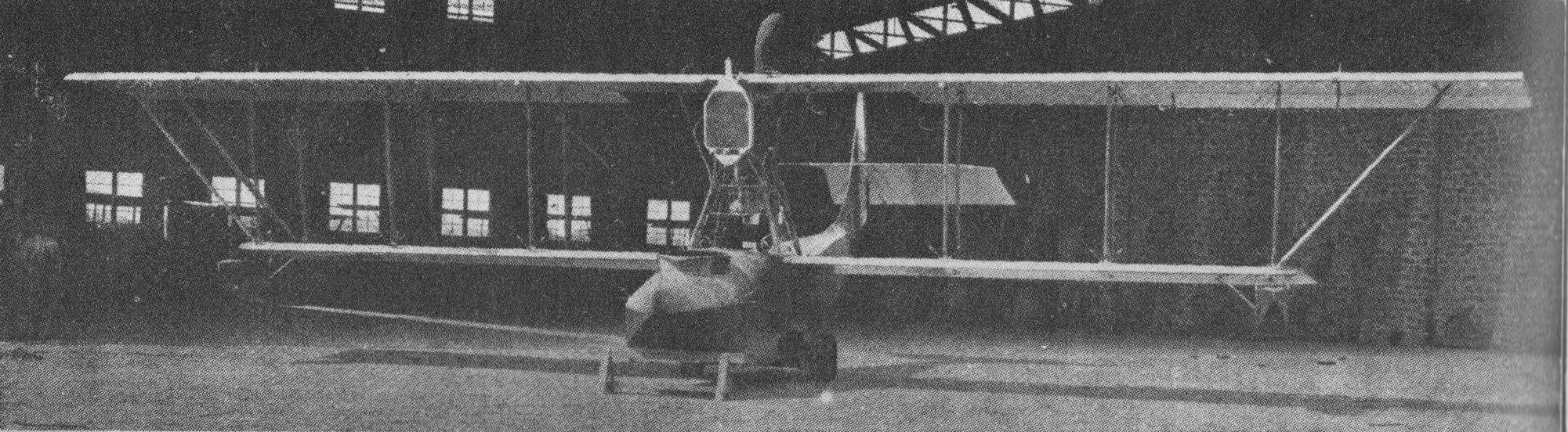 Donnet-Denhaut DD.8 flying boat